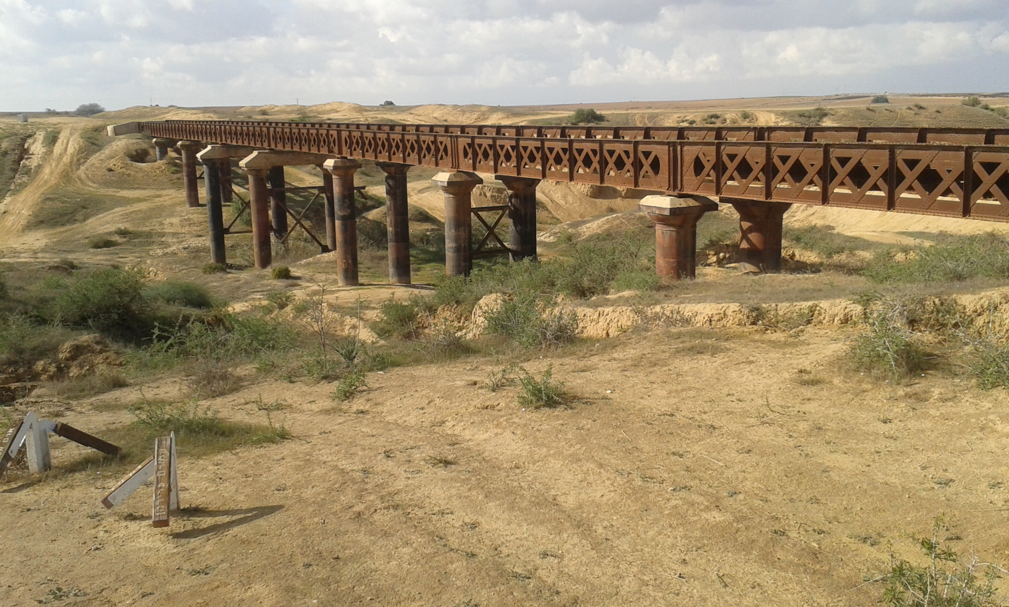 גשר הרכבת לייד אופקים בפארק שקד